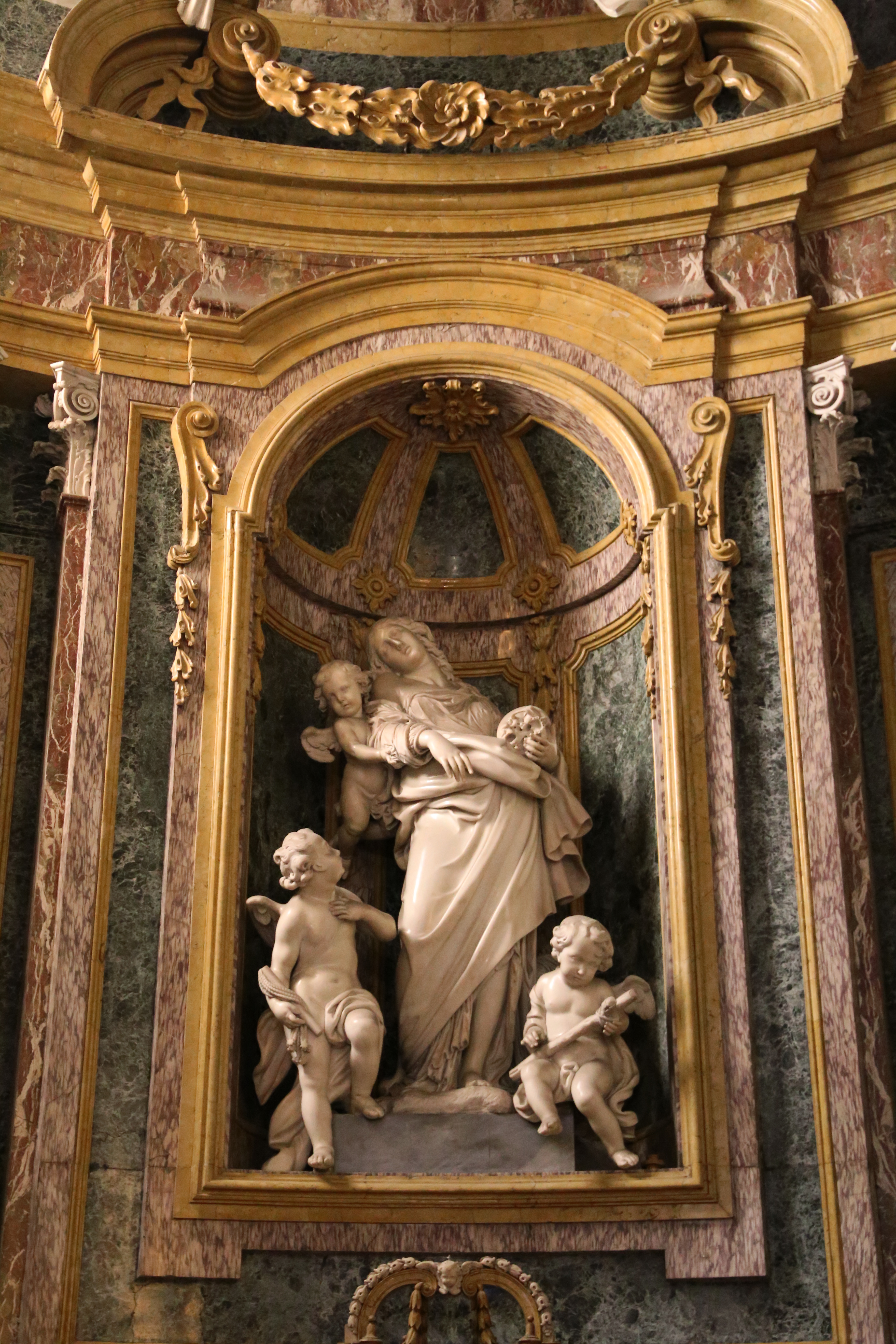 duomo di Sant'Evasio This is a photo of a monument which is part of cultural heritage of Italy.